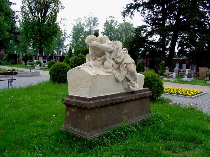 Jaroměř, Czech Republic. Kopie sochy "Plačící žena" na jaroměřském hřbitvě. Socha pochází z dílny Matyáše Brauna